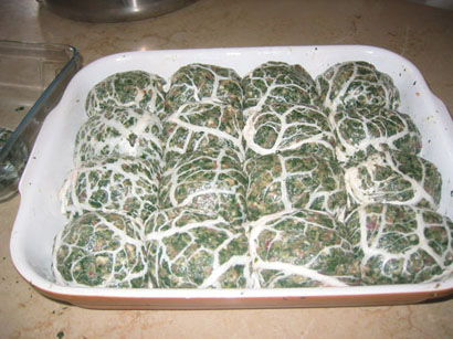 Septembre 2006